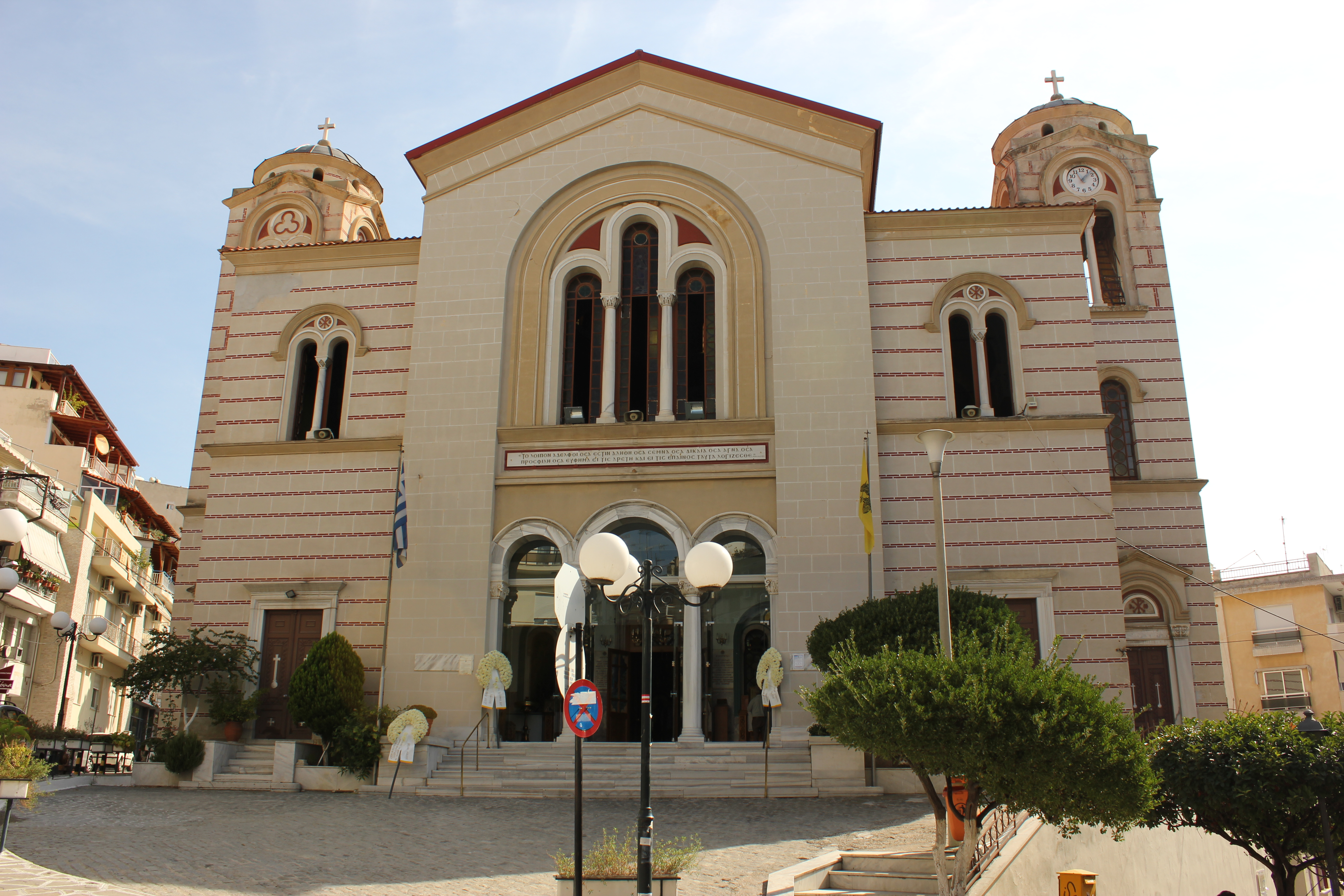 Църква „Свети Павел“, Кавала